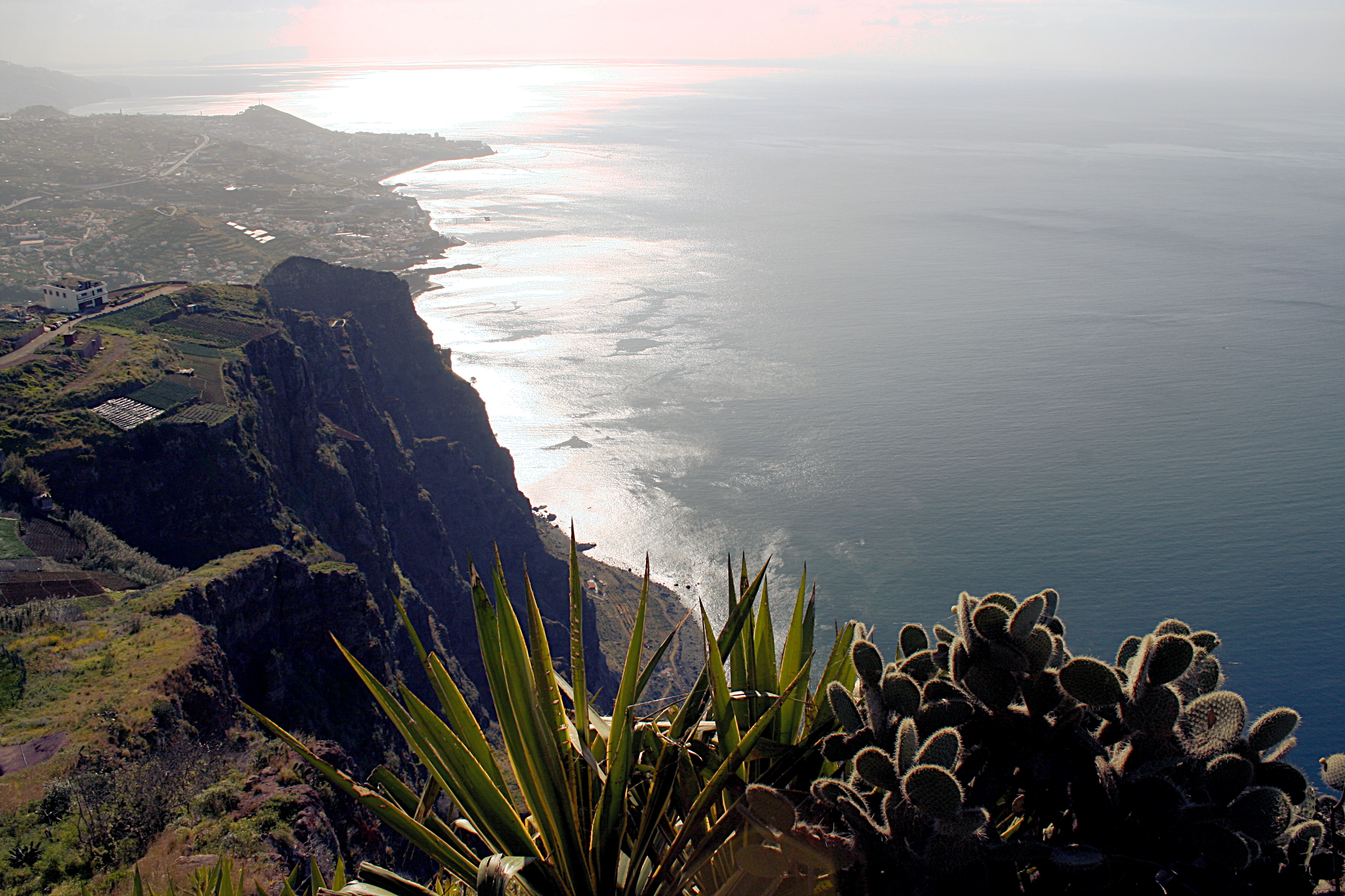 Madeira_Blick_von_cabo_girao_580_m_in_die_Tiefe